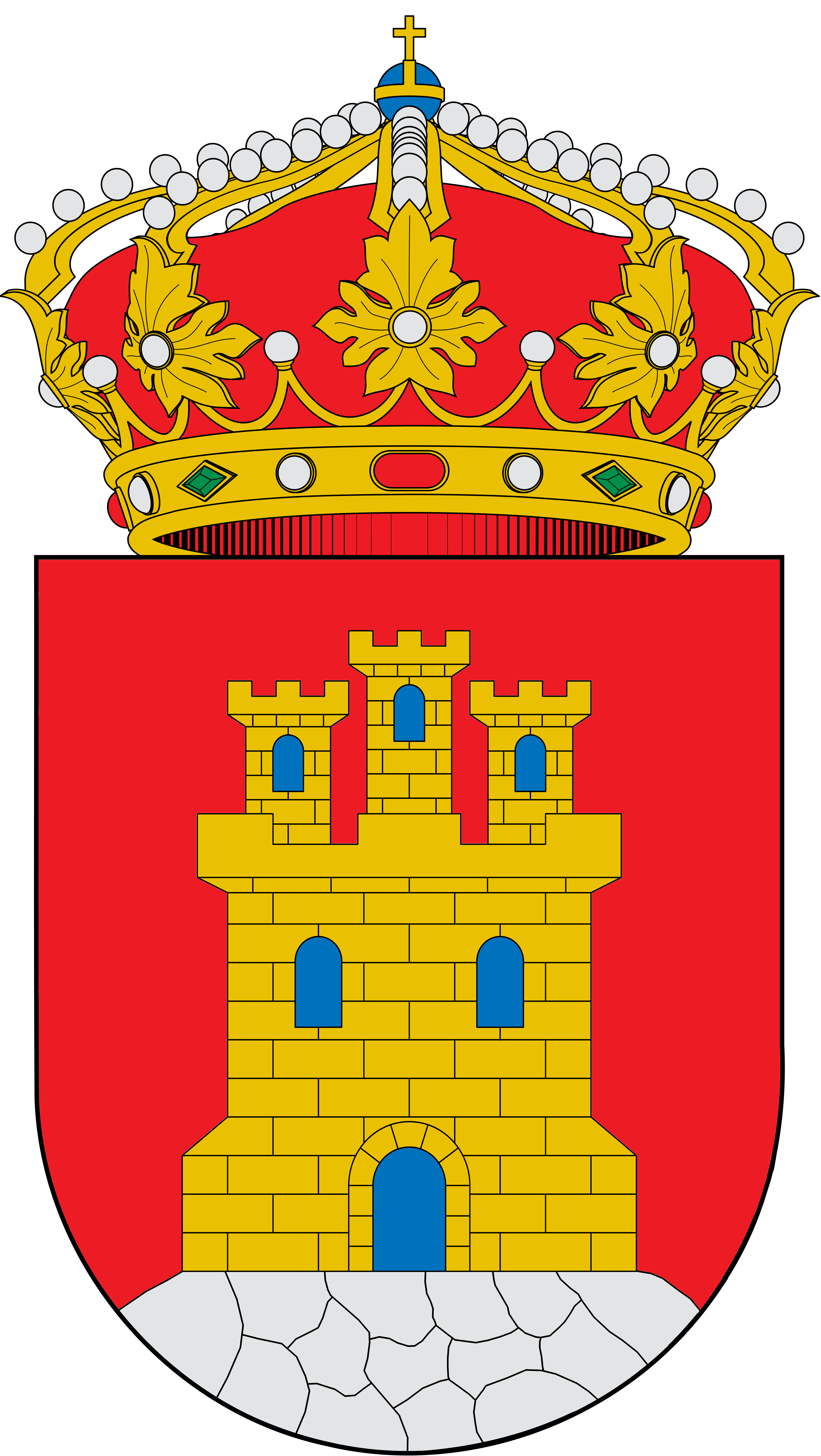 Escudo de Cañete la Real, Málaga: En campo de gules, castillo de oro, mamposteado de sable y aclarado de azur, sobre peña de plata. Corona real cerrada. [1]